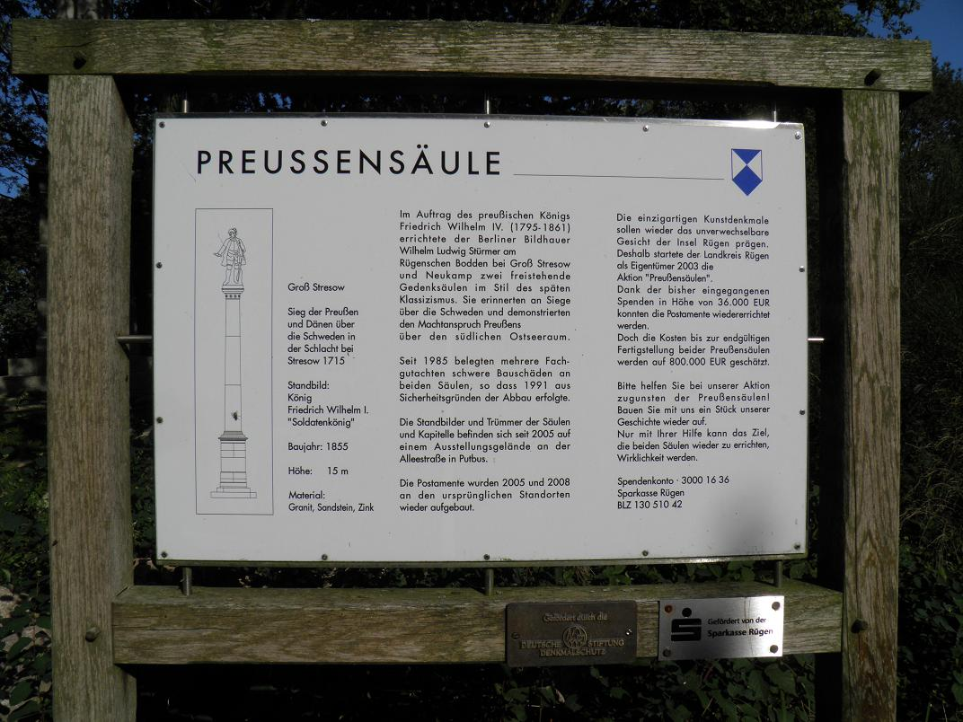 Infotafel Preußensäule Groß Stresow